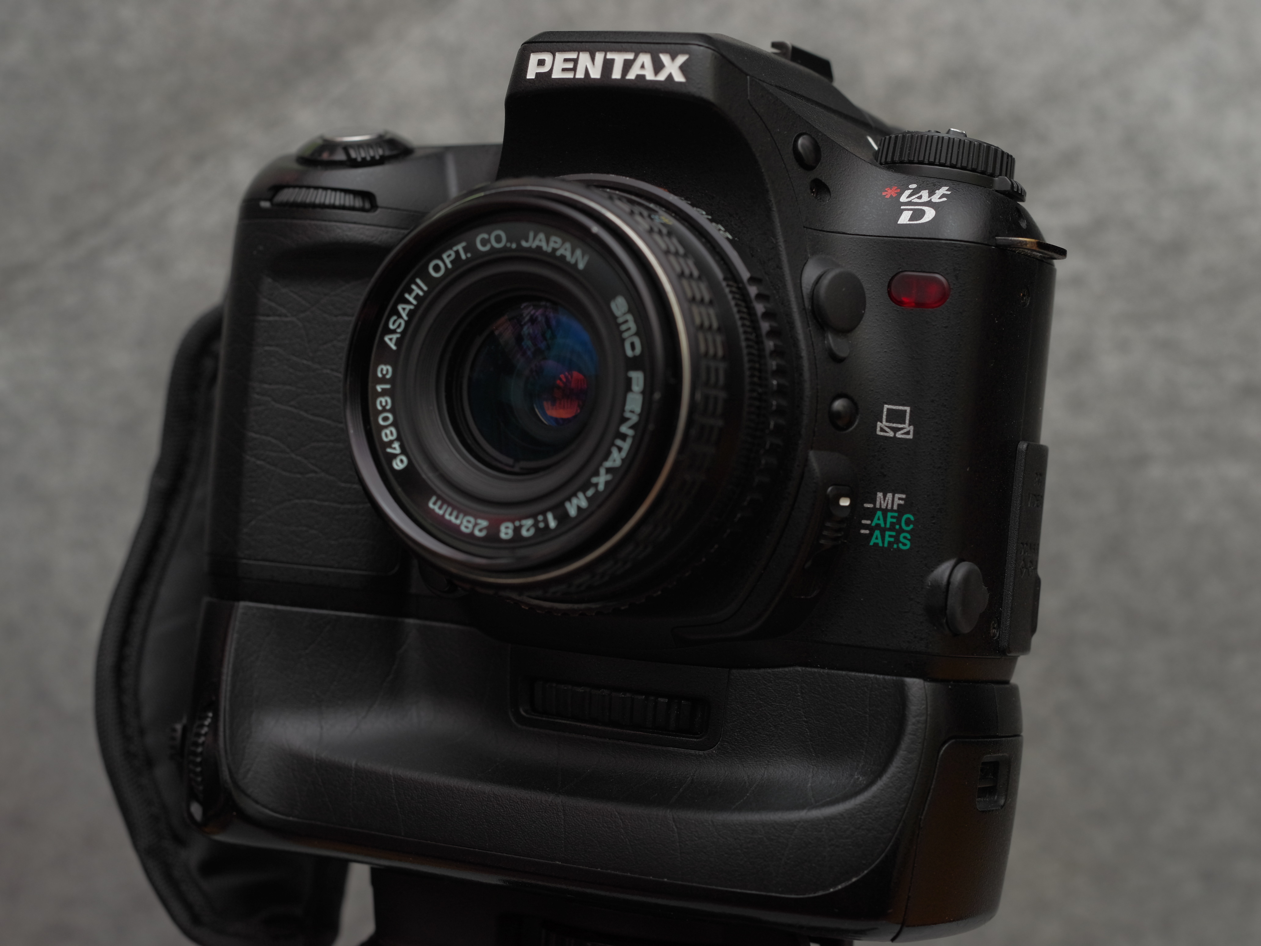 Pentax *istD (with D-BG1)